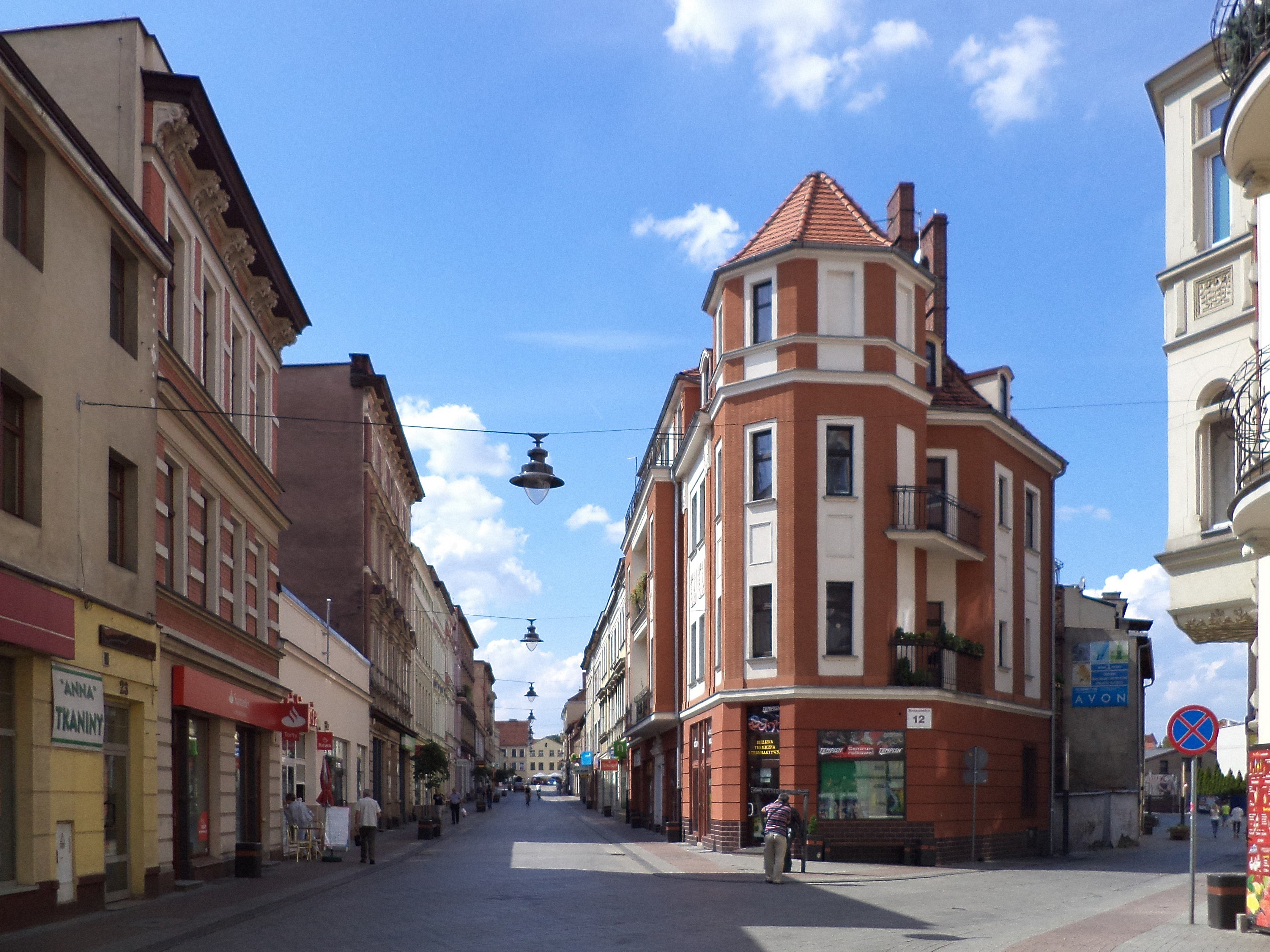 Ulica Krakowska w Tarnowskich górach - widok w kierunku Rynku. Po prawej widoczny wylot ul. Tylnej